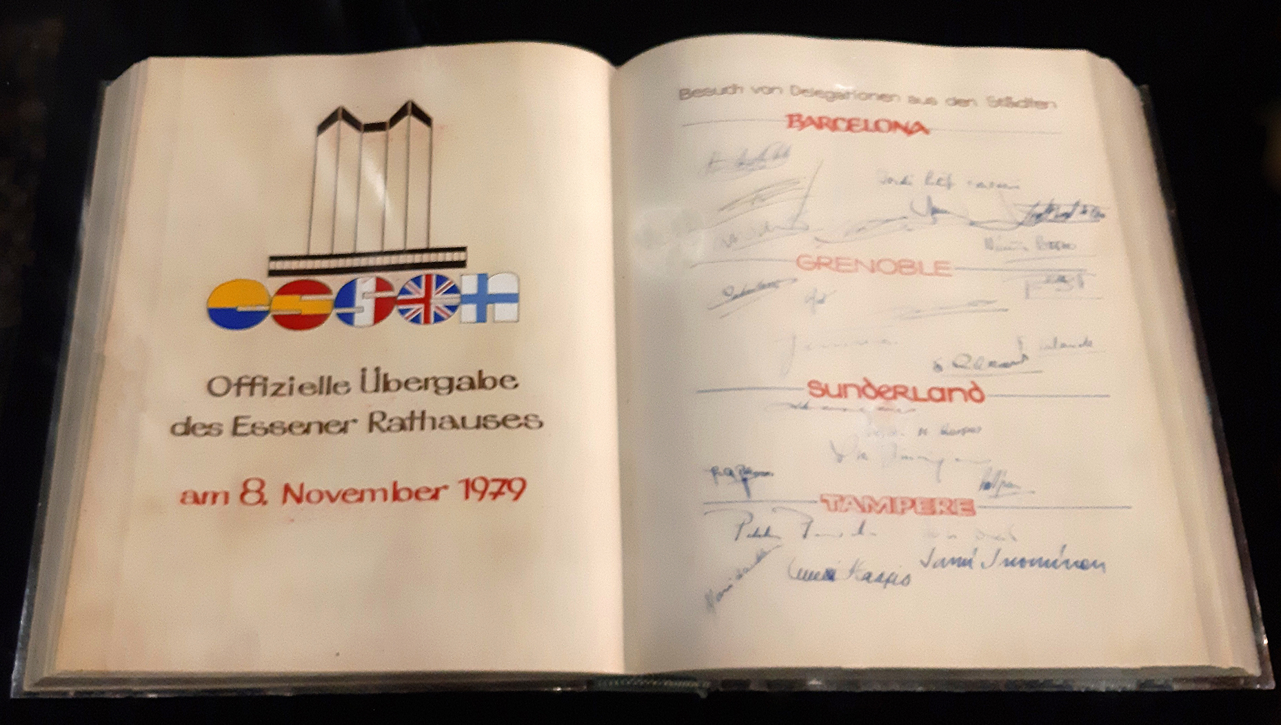 Stahlbuch der Stadt Essen, aufgeschlagen ist die Seite zur Eröffnung des Essener Rathauses 1979 mit den Unterschriften von Delegierten aus vier Städten; ausgestellt zum 40. Jahrestag im Rathaus